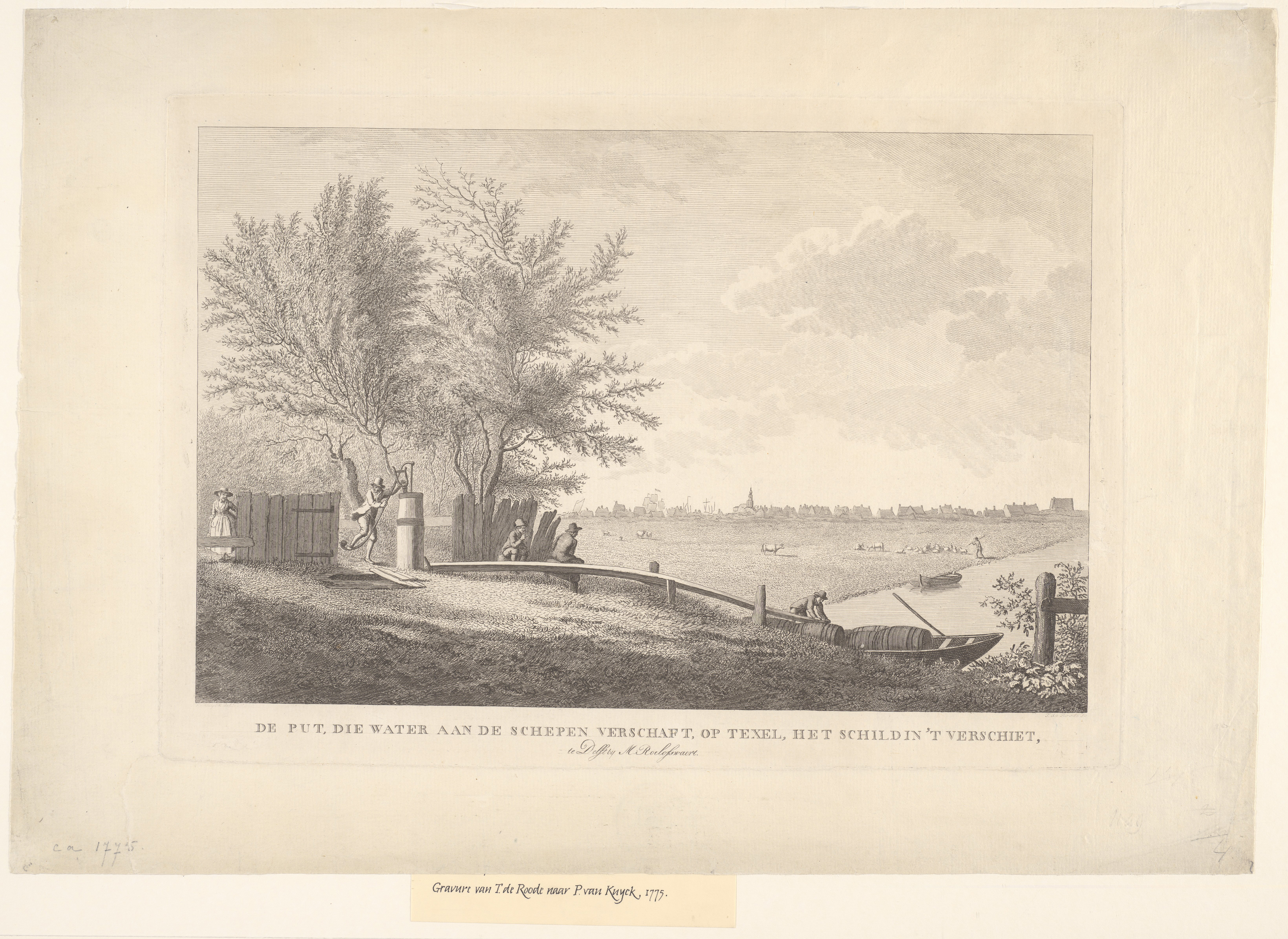 Waterput op Texel (Oudeschild), Skilsloot, nabij Brakestein. "De Put, Die Water Aan de Schepen Verschaft, op Texel. Het Schild in 't verschiet. te Delft bij M. Roelofswaert" Deze waterput op Texel, verpacht aan het Weeshuis, zorgde voor inkomsten door de levering van drinkwater aan de schepen in de haven van 'Het Schild'. Collectie: Provinciale Atlas - Prenten en Tekeningen Inventarisnummer: NL-HlmNHA_359_003238_M Beschrijving: Waterput op Texel, op de achtergrond skil (= Oudeschild). Op de voorgrond de Skilsloot, nabij Brakestein. 1 topogr. prent: ets en gravure. l.o.: P. van Kuyck delt.; r.o.: T. de Roode sc. afb.: 246 x 386 mm. Code: NL-HlmNHA_359_3238 Documenttype: Grafiek drukwerk uit 1789 Vervaardiger: Cuyck, Pieter van (II) (1720-1787), Roode, Theodorus de (1736-1793) Uitgever: Roelofswaert, M., Delft Literatuur: Afb.: Brieven over Texel ... / P. van Cuyck. - Delft, 1789. - [Facsimile-uitgave 1969].Afb.: Het veranderend gezicht van Noord-Holland. - Amsterdam, 1976. - p. 35